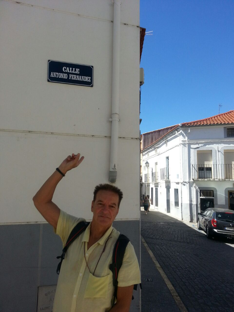 Comienzo de la calle mostrada por su hijo menor